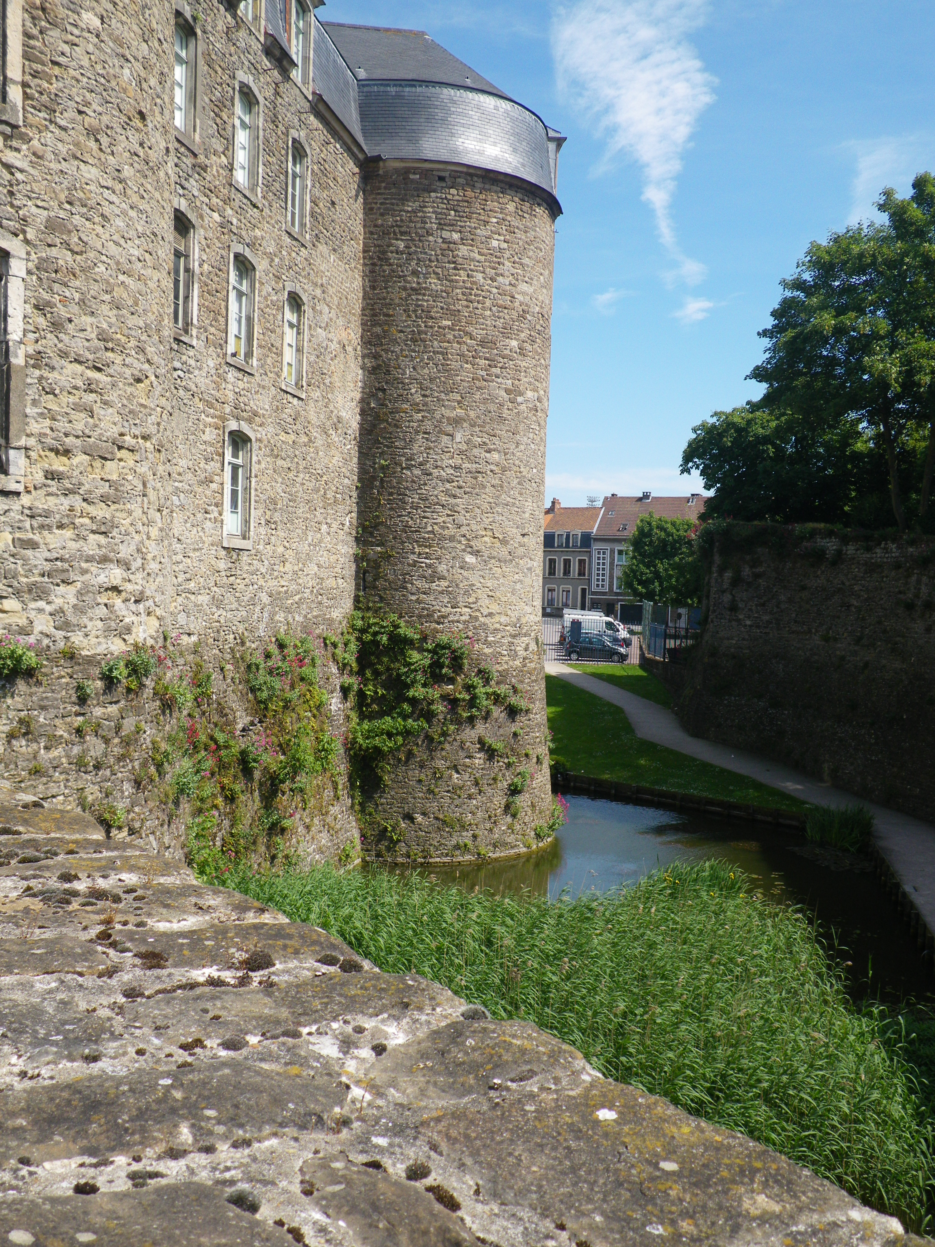 Château d'Aumont